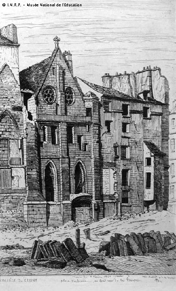 Gravure représentant le collège de Cluny